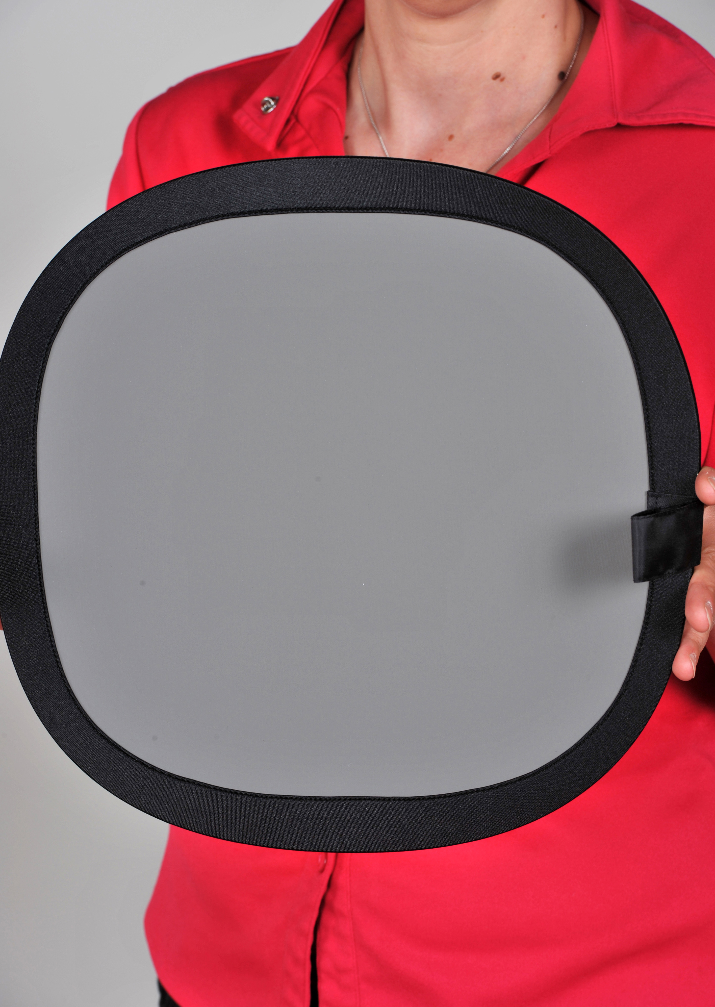 Landtagsprojekt Bayern The making of this work was supported by Wikimedia Austria. For other files made with the support of Wikimedia Austria, please see the category Supported by Wikimedia Österreich.